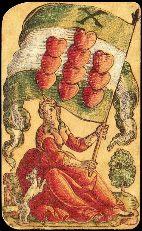 Chorągiew Czerwienna w Kartach Niemieckich